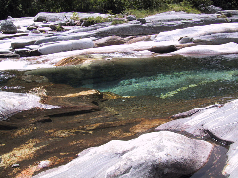 Der Wildwasserfluss Verzasca ca. 100 m. nach der Brücke Ponte dei Salti.